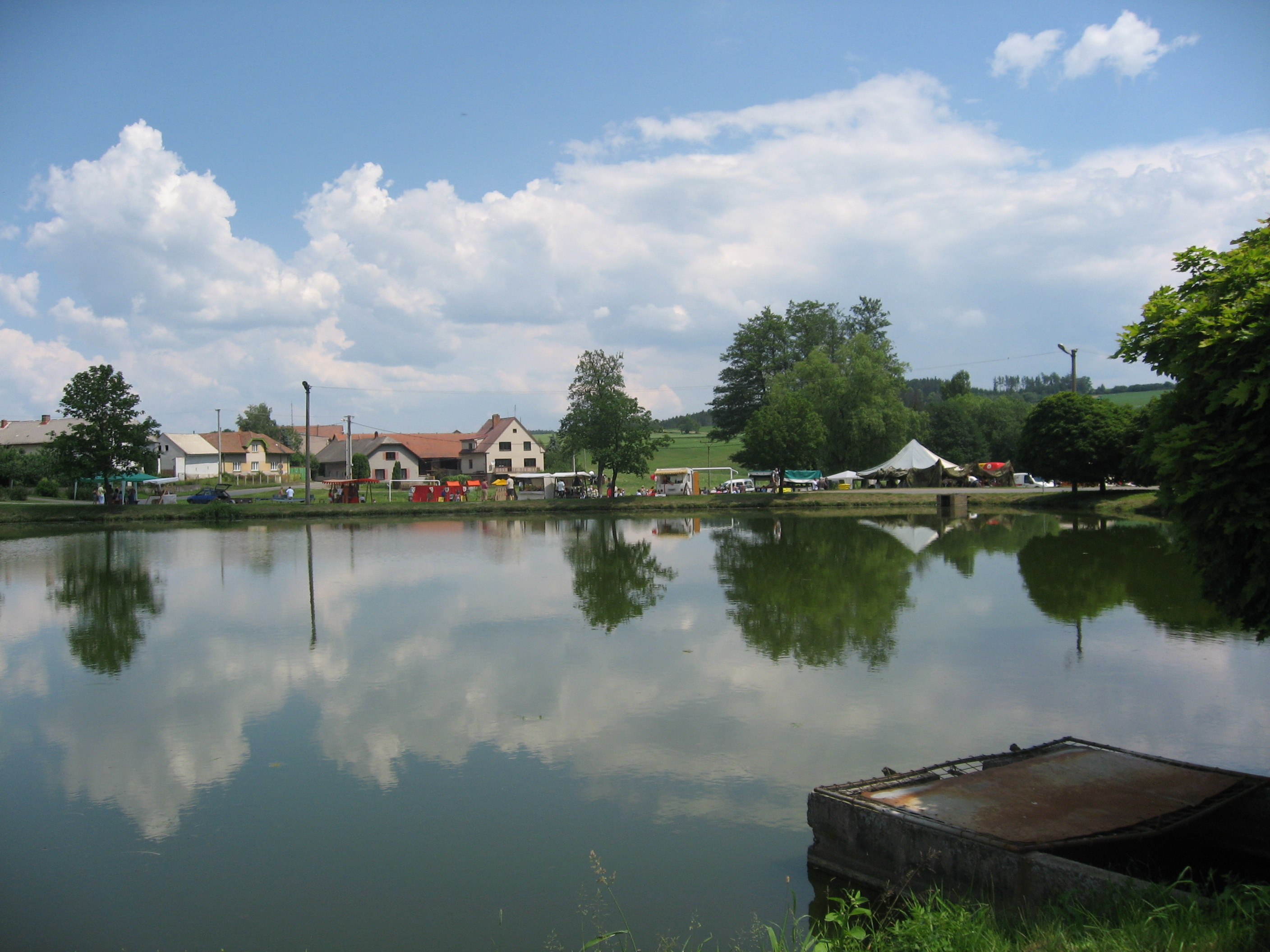 Okrouhlička, rybník